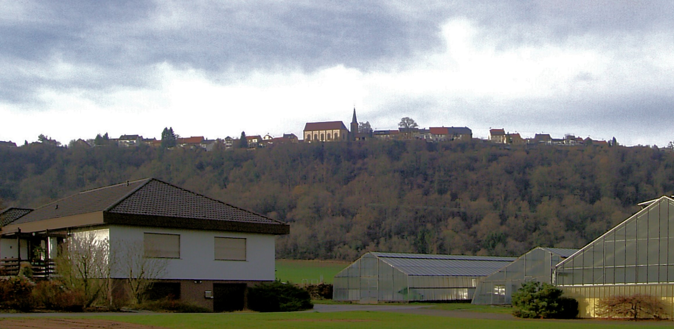 Blick auf Berus von Südosten aus